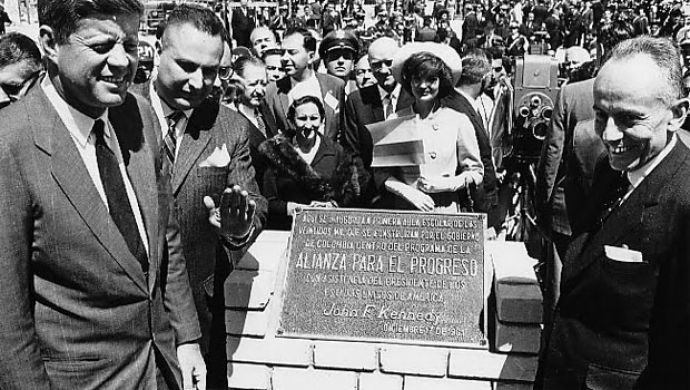 1961 J. F. Kennedy wurde Bogotá besucht und er grundete Techo Stadt